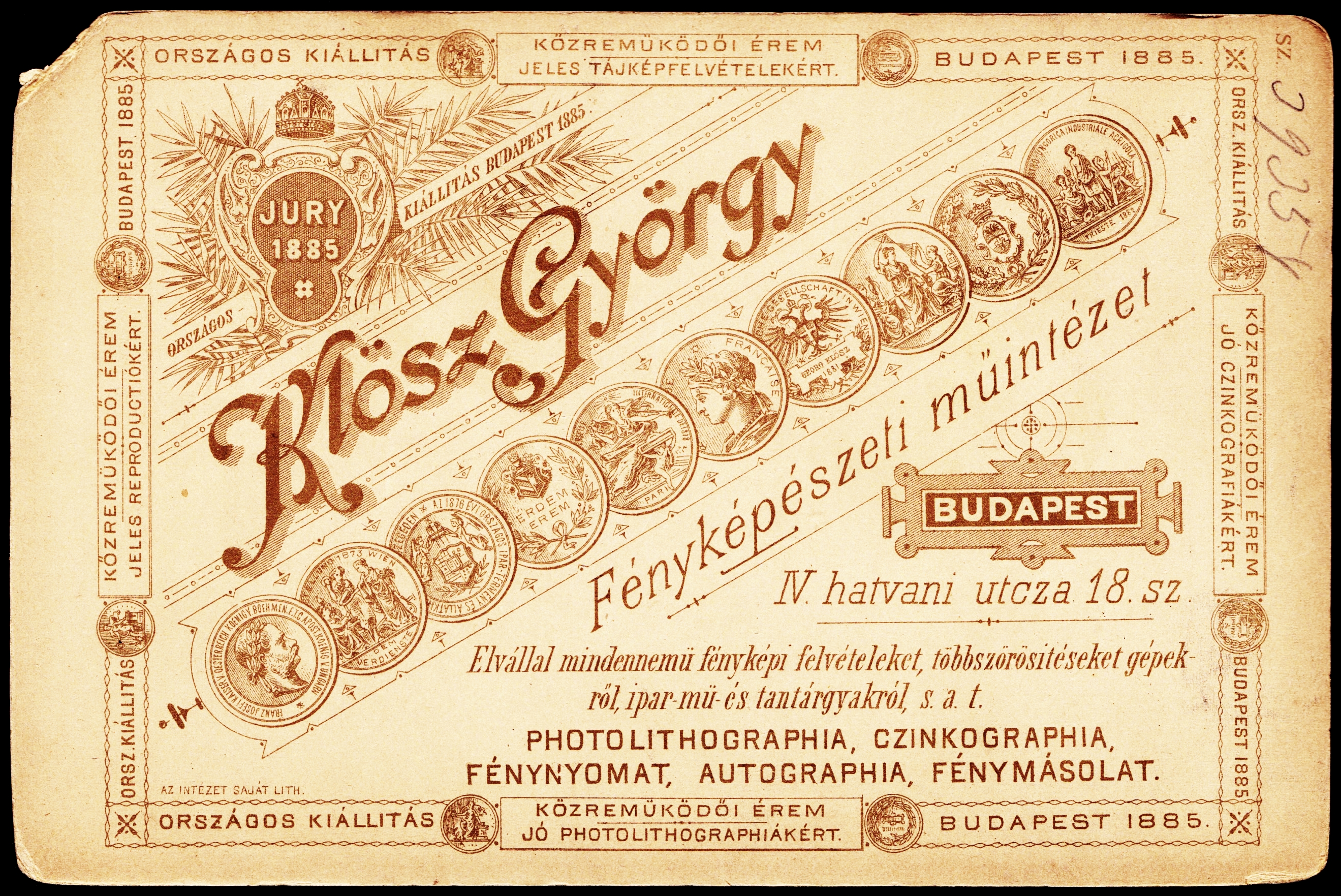 Kossuth Lajos (Hatvani) utca 18., Klösz György fényképészeti műintézete. Location: Hungary, Budapest V. Tags: verso, photographer, studio, Budapest Title: Kossuth Lajos (Hatvani) utca 18., Klösz György fényképészeti műintézete.